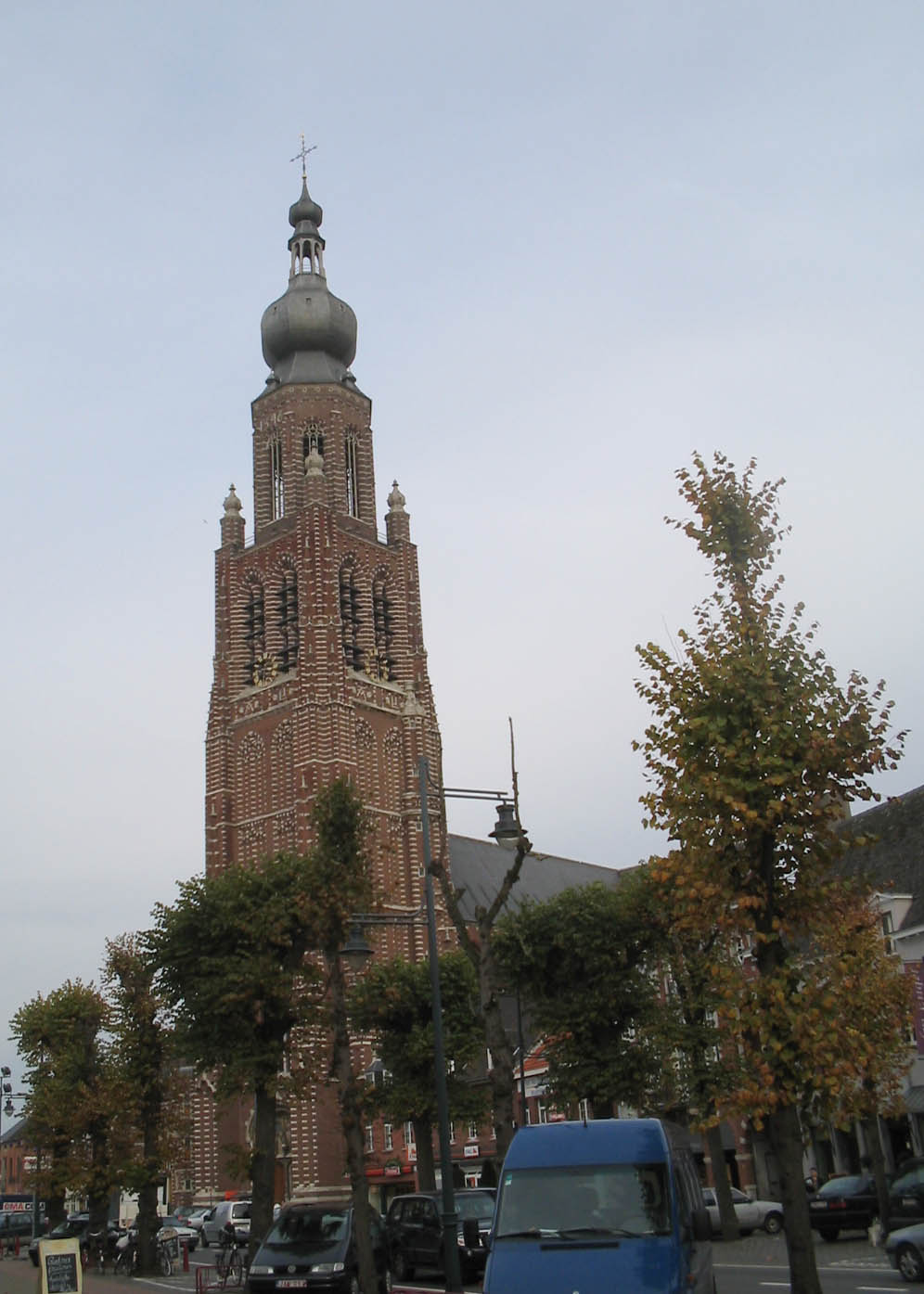 Sint-Katharinakerk Hoogstraten, 28 oktober 2005